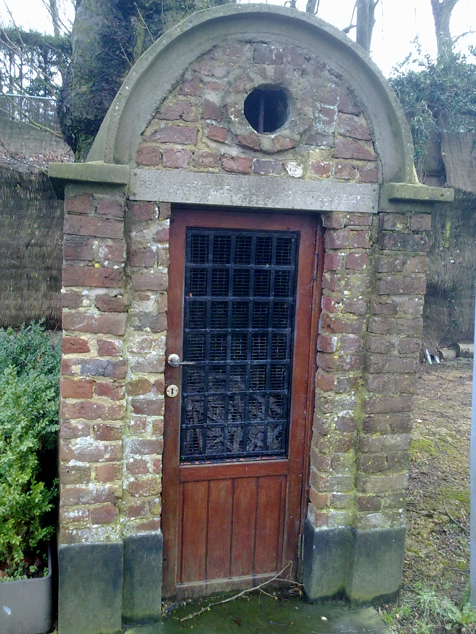 Dans le jardin de la Ferme du Caillou, ossuaire en briques édifié en 1912 pour rassembler les ossements de soldats de 1815 trouvés dans les travaux des champs et chantiers divers. sur le linteau : "Pro Imperator Saepe, Pro Patria Semper" (Pour l'Empereur Souvent, Pour la Patrie Toujours).